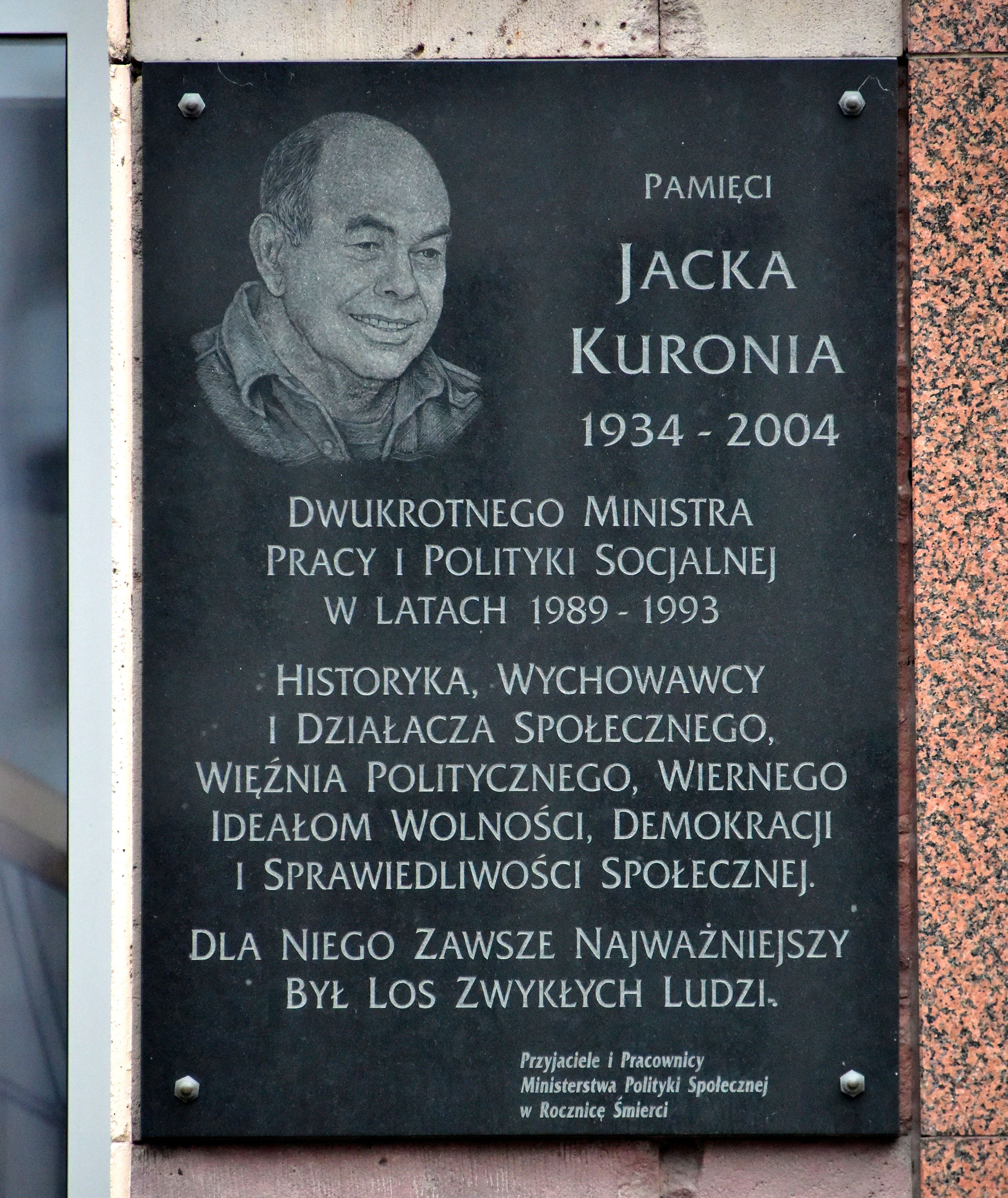 Tablica upamiętniająca Jacka Kuronia na fasadzie Ministerstwo Rodziny, Pracy i Polityki Społecznej (od strony ul. Brackiej)